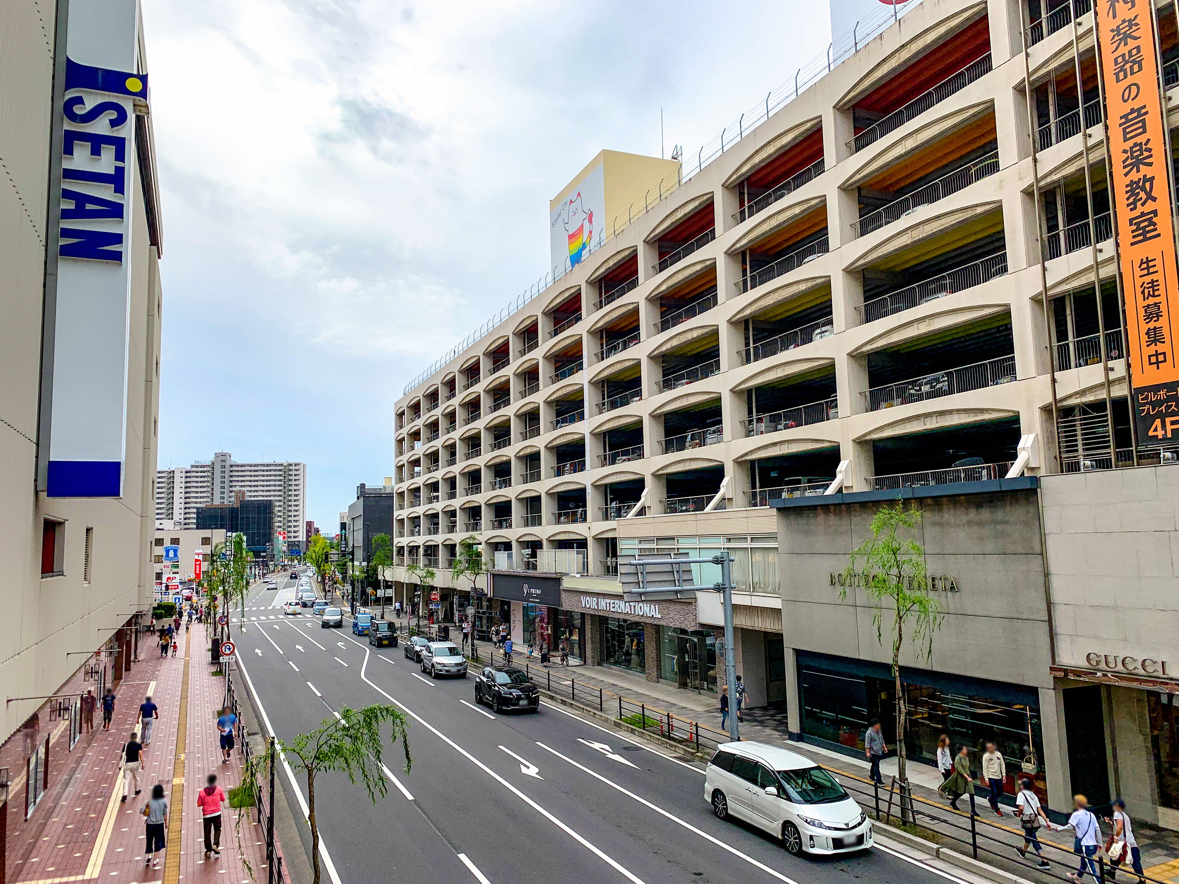 万代シテイ内を走る市道東港線（2019年9月撮影）。第二駐車場ビルA棟（右）1階の路面ショップの一部は新潟伊勢丹の店舗となっている。